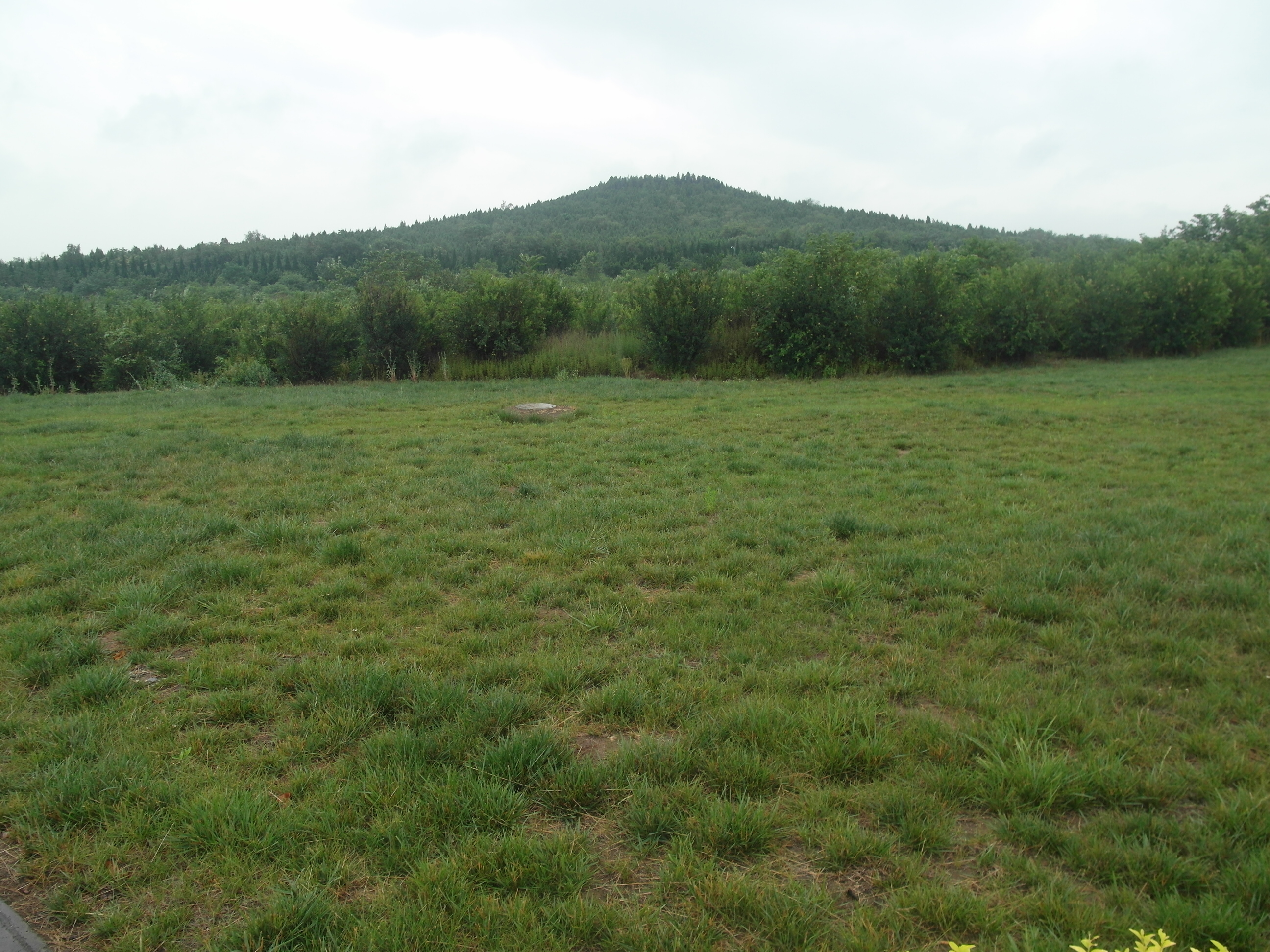 位于陕西省西安市东的临潼区